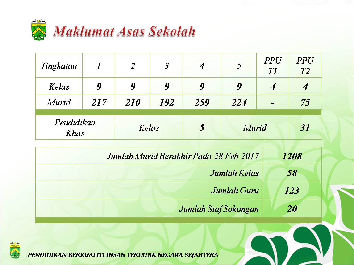 Enrolmen Murid dan Kelas